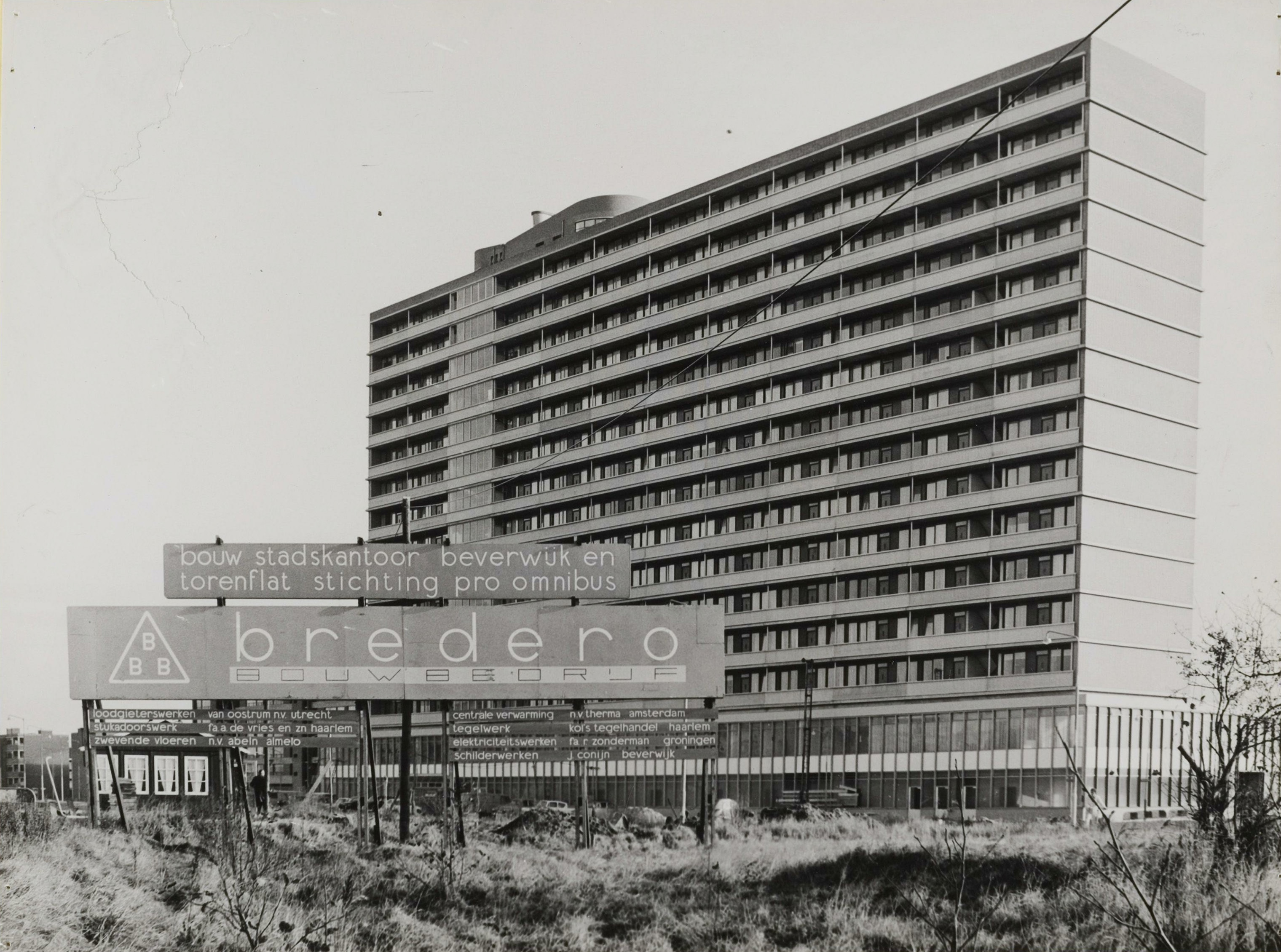 President Kennedyplein 1, Beverwijk. Stadskantoor, Bredero Bouwbedrijf Fototitel: (F39DE13A-FB8E-11DF-9E4D-523BC2E286E2) 0 Collectie: foto's van de gemeente Beverwijk, Collectie van Inventarisnummer: NL-HlmNHA_1337_KNA002001172 Soort: Foto Beschrijving: President Kennedyplein 1. Stadskantoor Datering: 1964 - 1966 Documenttype: Topografische prenten, tekeningen en foto's Provincie: Noord-Holland Gemeente: Beverwijk Plaatsnaam: Beverwijk Straatnaam: President Kennedyplein Auteursrecht; Nee Techniek: Foto